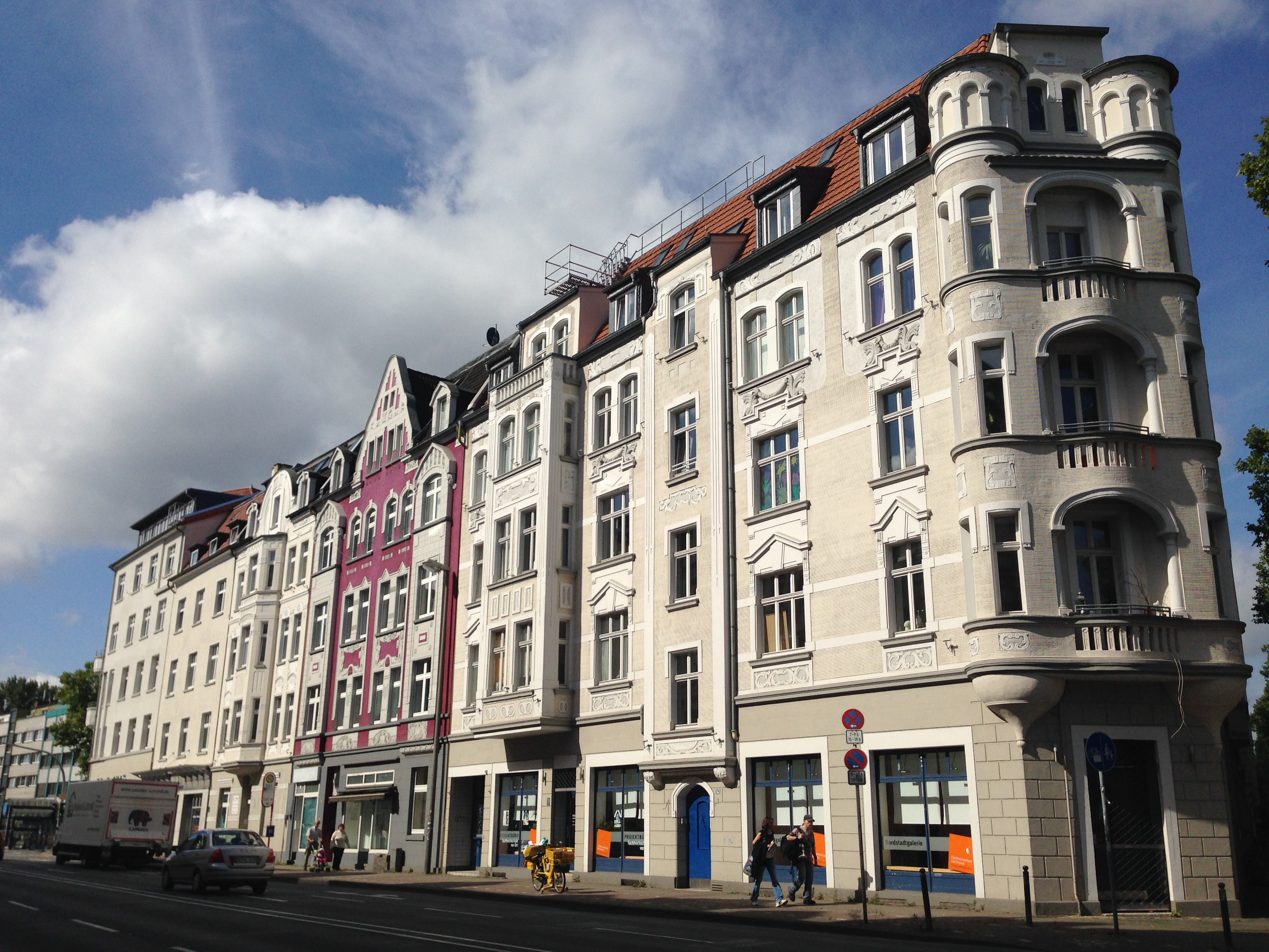 Jugendstil-Architektur in der Dortmunder Nordstadt, vorne/rechts Wohn- und Geschäftshaus Bornstraße 142 This is a photograph of an architectural monument. 0141